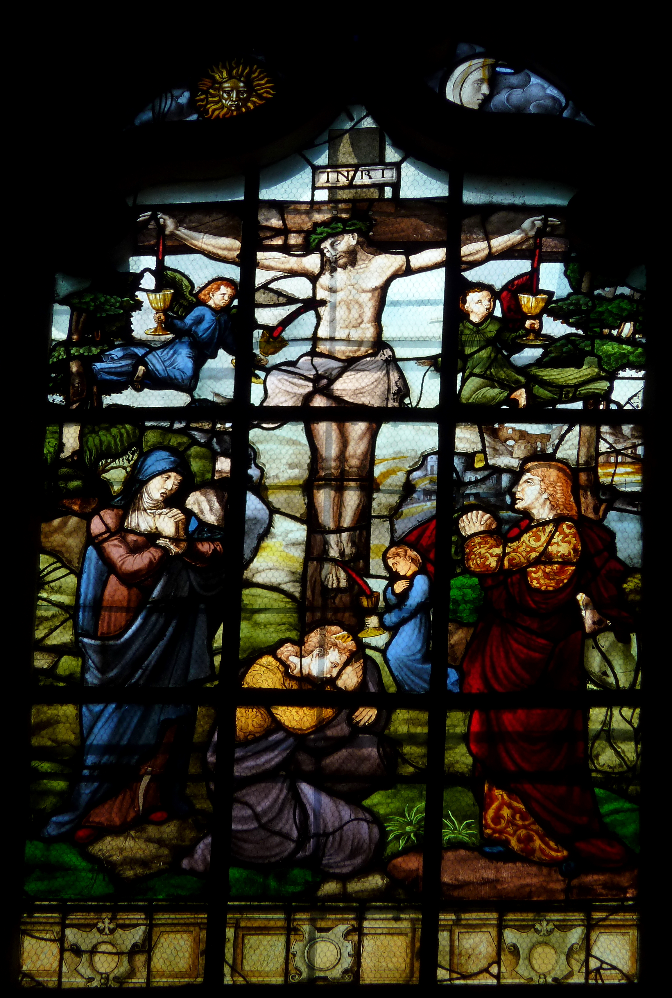 Katholische Pfarrkirche Saint-Martin in Triel-sur-Seine, einer Gemeinde im Département Yvelines (Île-de-France), Bleiglasfenster, oberes Chorfenster; Darstellung: Kreuzigung Christi